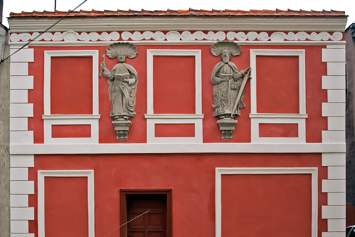 Kożuchów-figury Piotra i Pawła